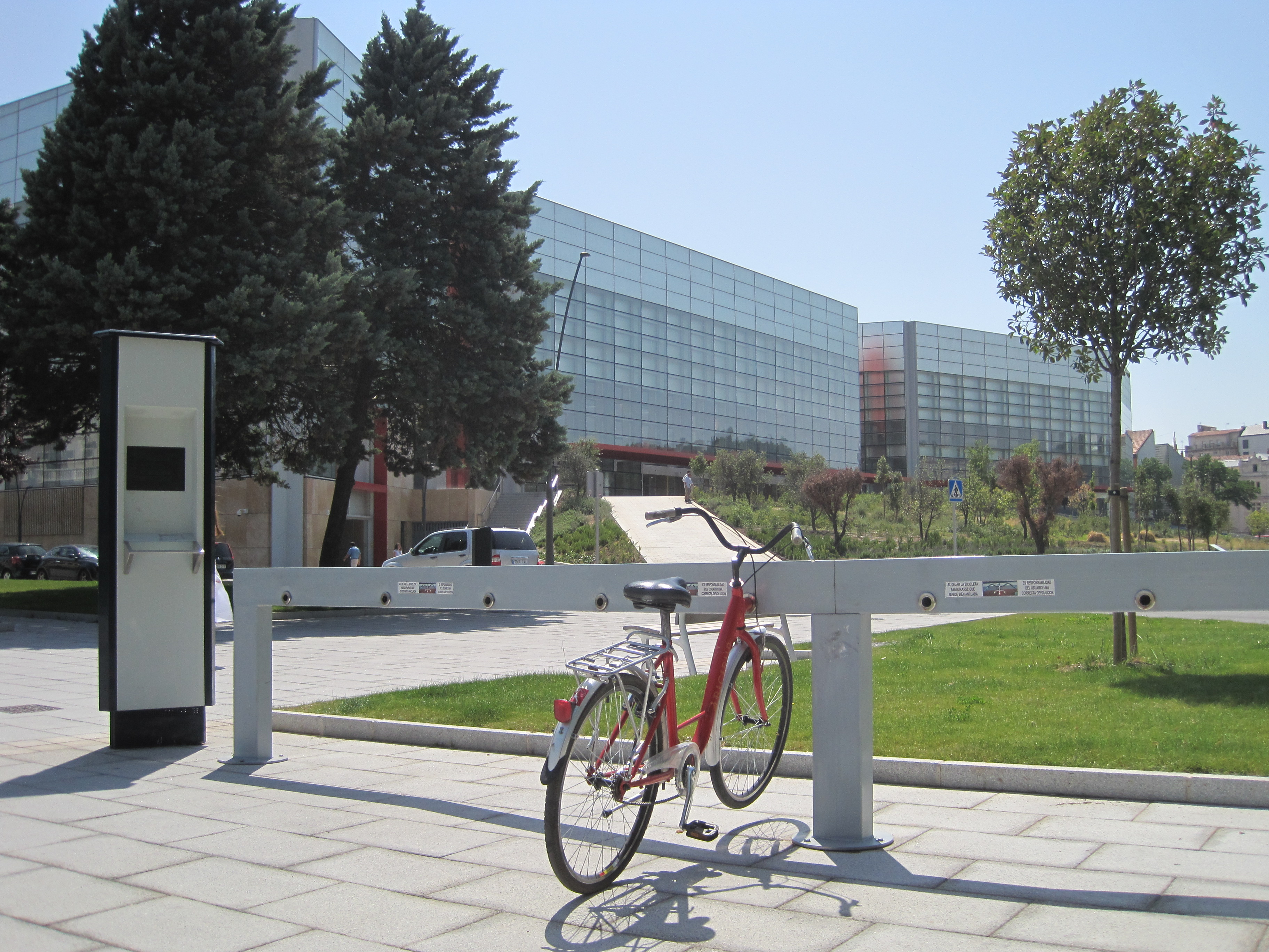 Vista de la bancada de Bicibur frente al MEH.